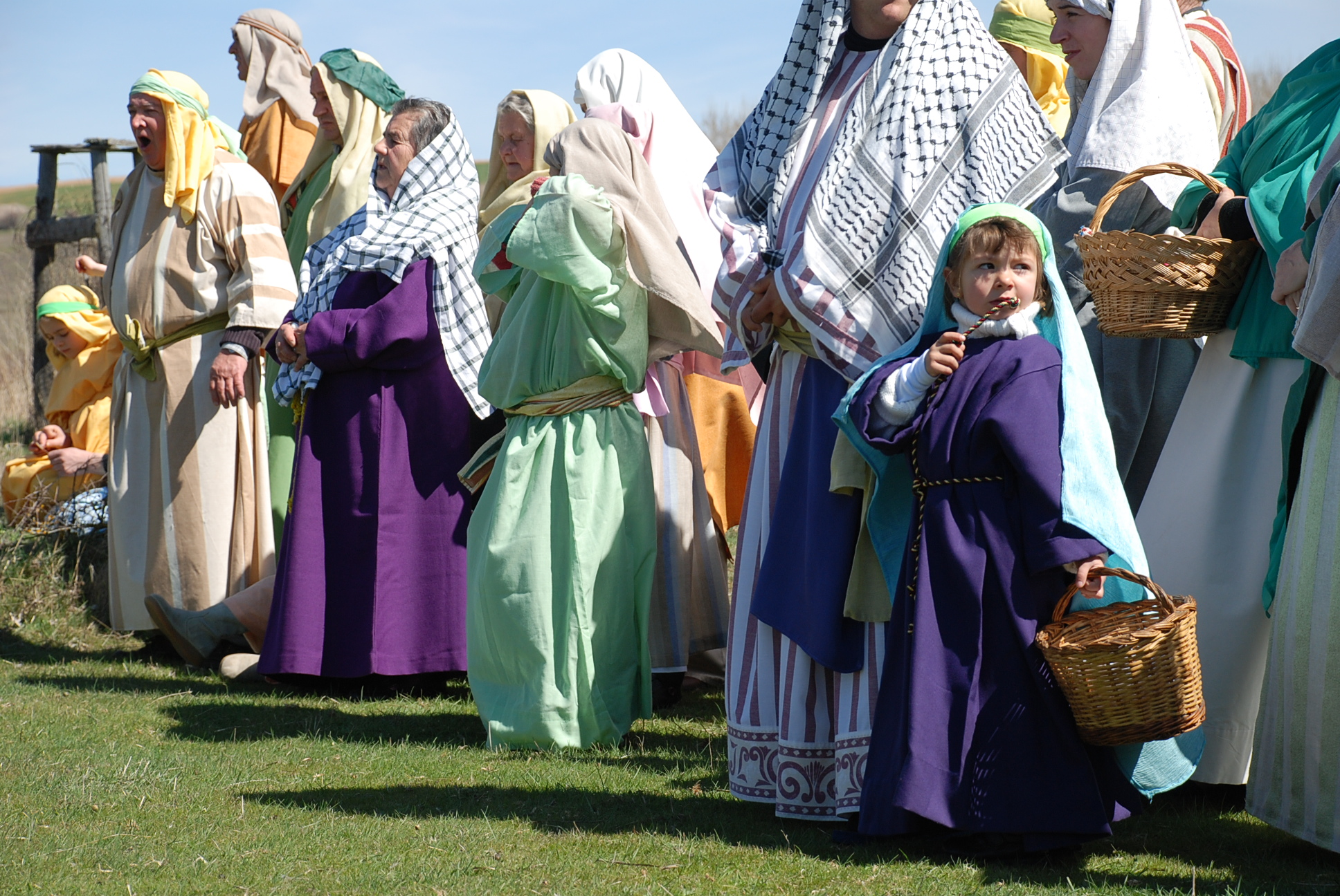 Representación del Via Crucis en el pueblo. Semana Santa 2008.